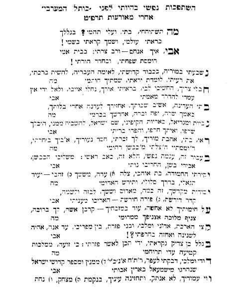 קינת רבי נח גד וינטרוב על מאורעות תרפ"ט